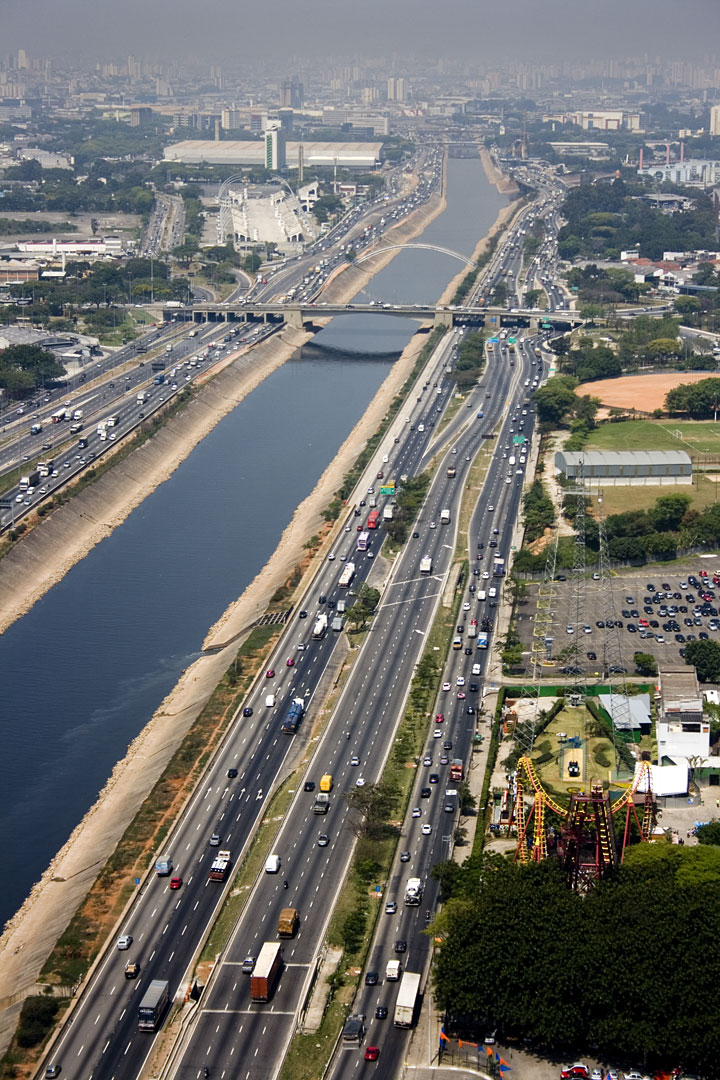 Vista panorâmica da Marginal Tietê, São Paulo, Brasil.